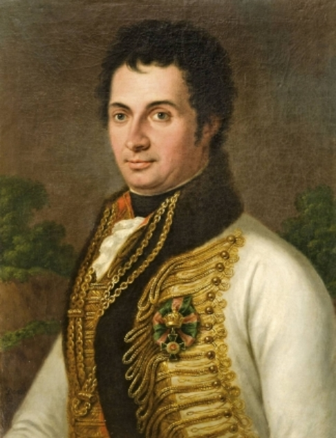 Csekonics József tábornok, császári és királyi generál főstrázsamester, a magyar állami ménestelepek megalapítója.